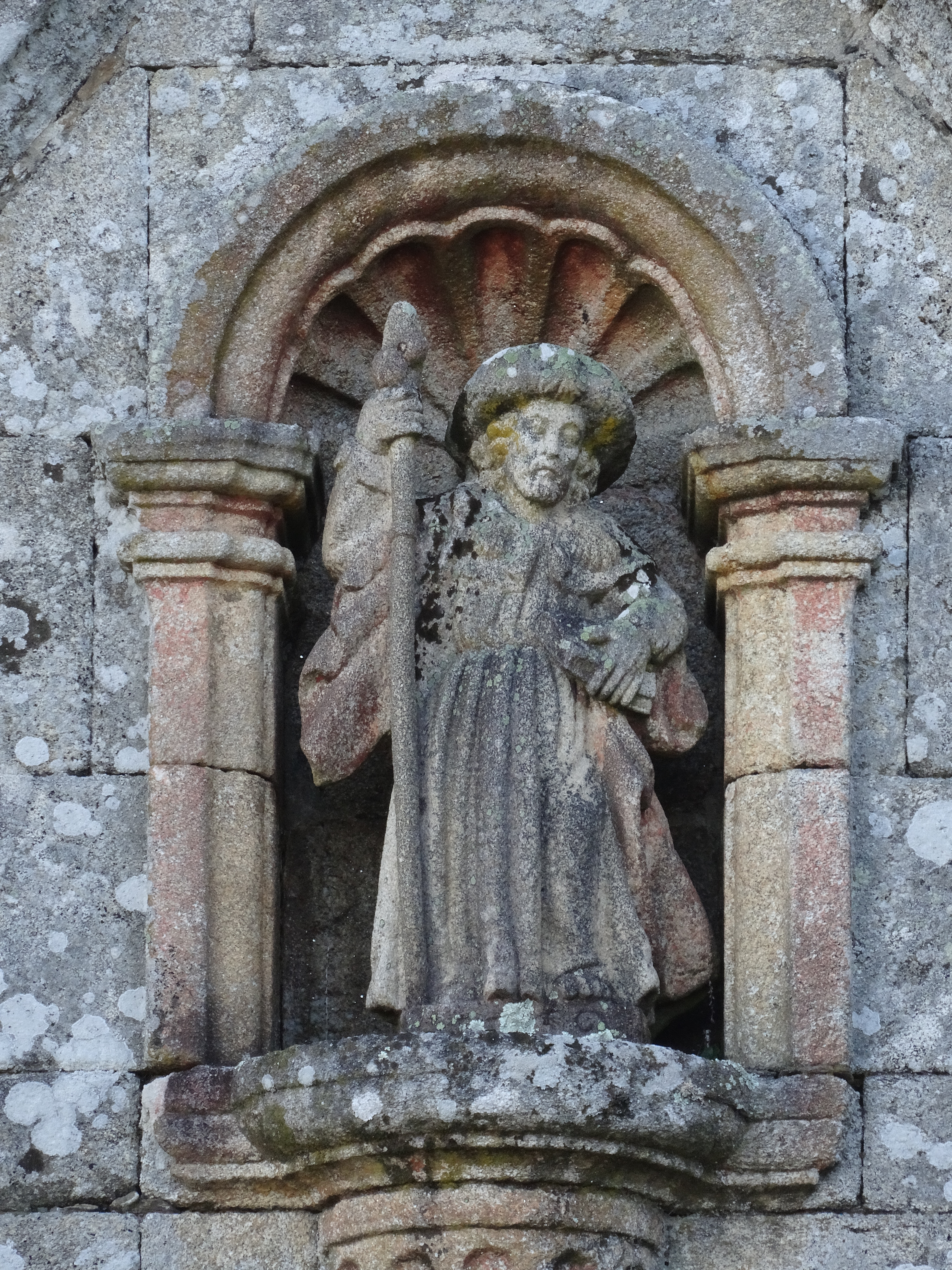 Ver título.